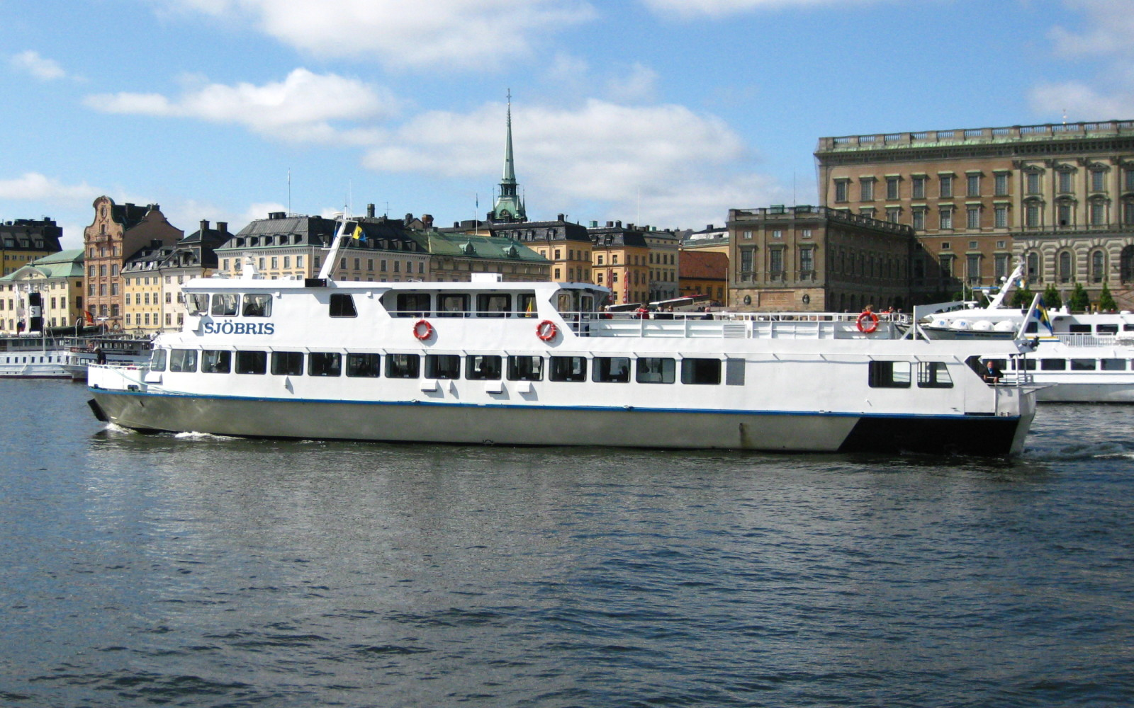 M/S Sjöbris